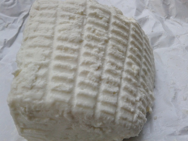 Ricotta di pecora di Rosciolo